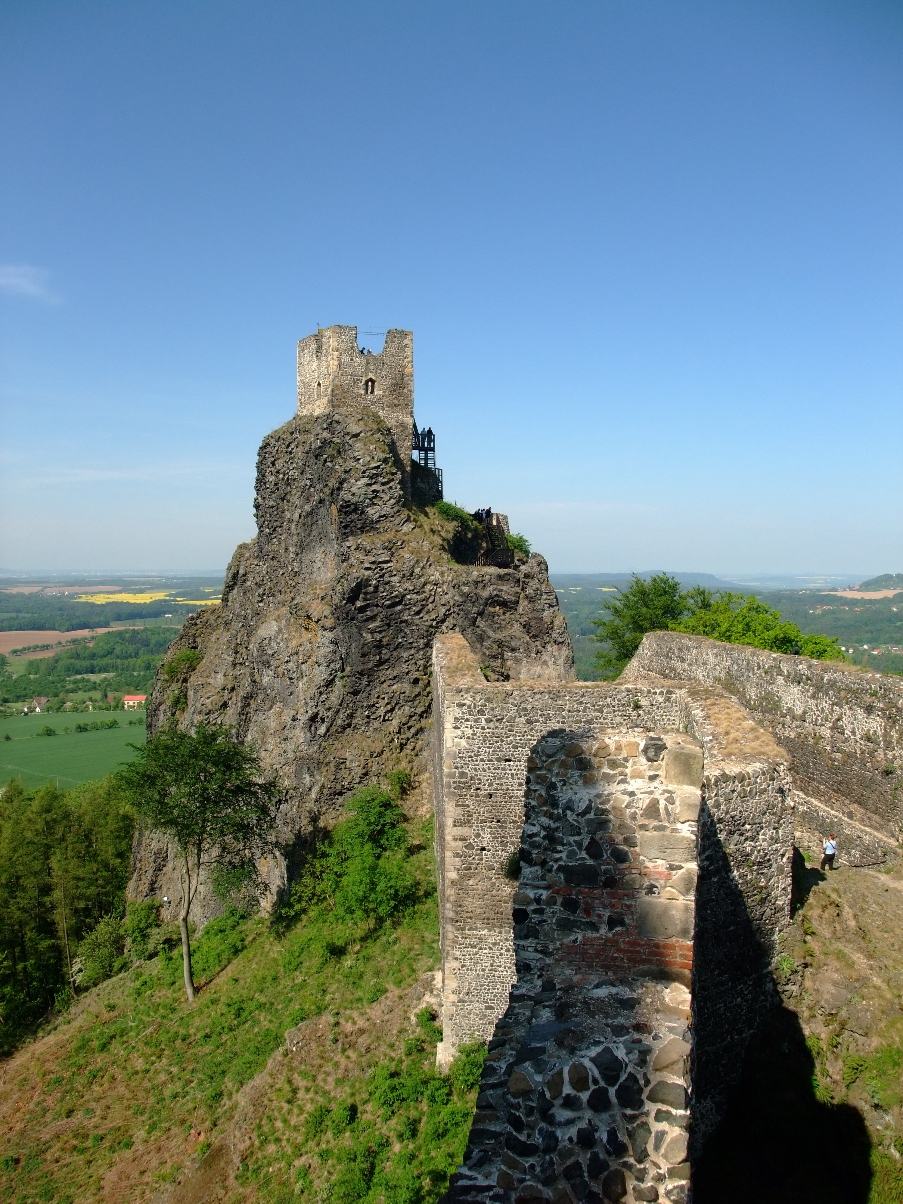 Hrad Trosky, Troskovice.